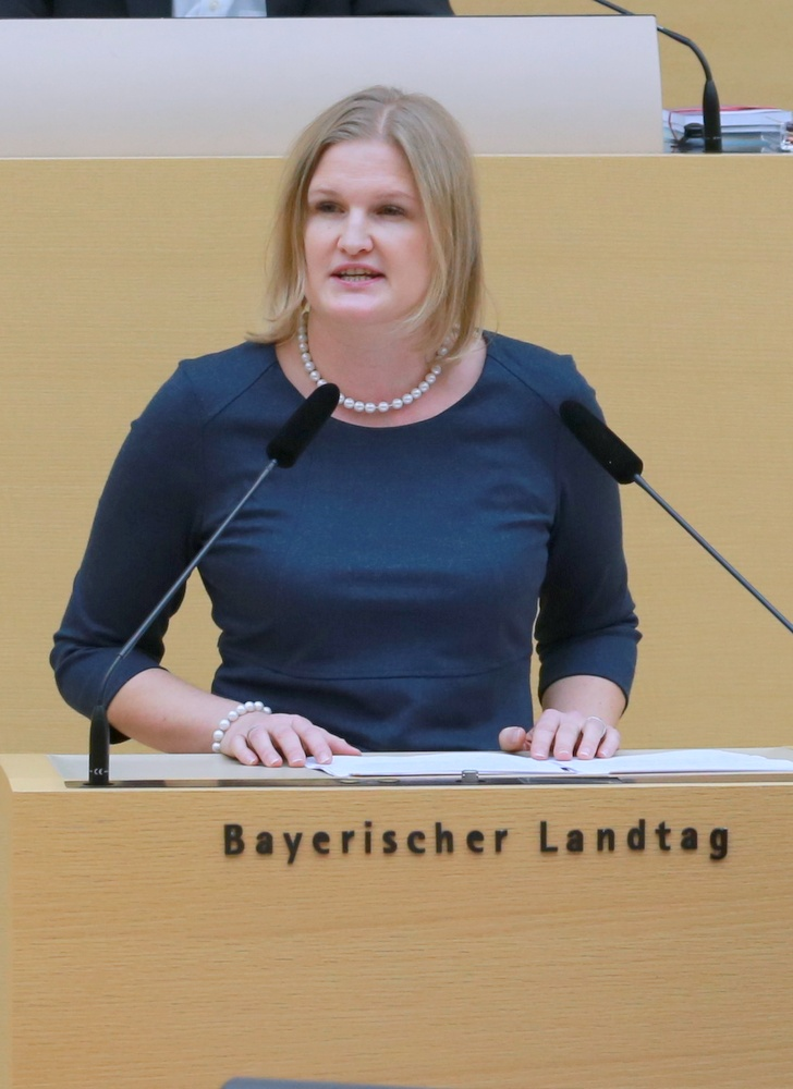 Katrin Ebner-Steiner, deutsche Politikerin (AfD), eine der beiden Vorsitzenden der AfD-Fraktion im Bayerischen Landtag. Hier während ihrer Rede am 11. Dezember 2018 im Plenum des Bayerischen Landtags. Titel des Werks: "Katrin Ebner-Steiner (AfD)"